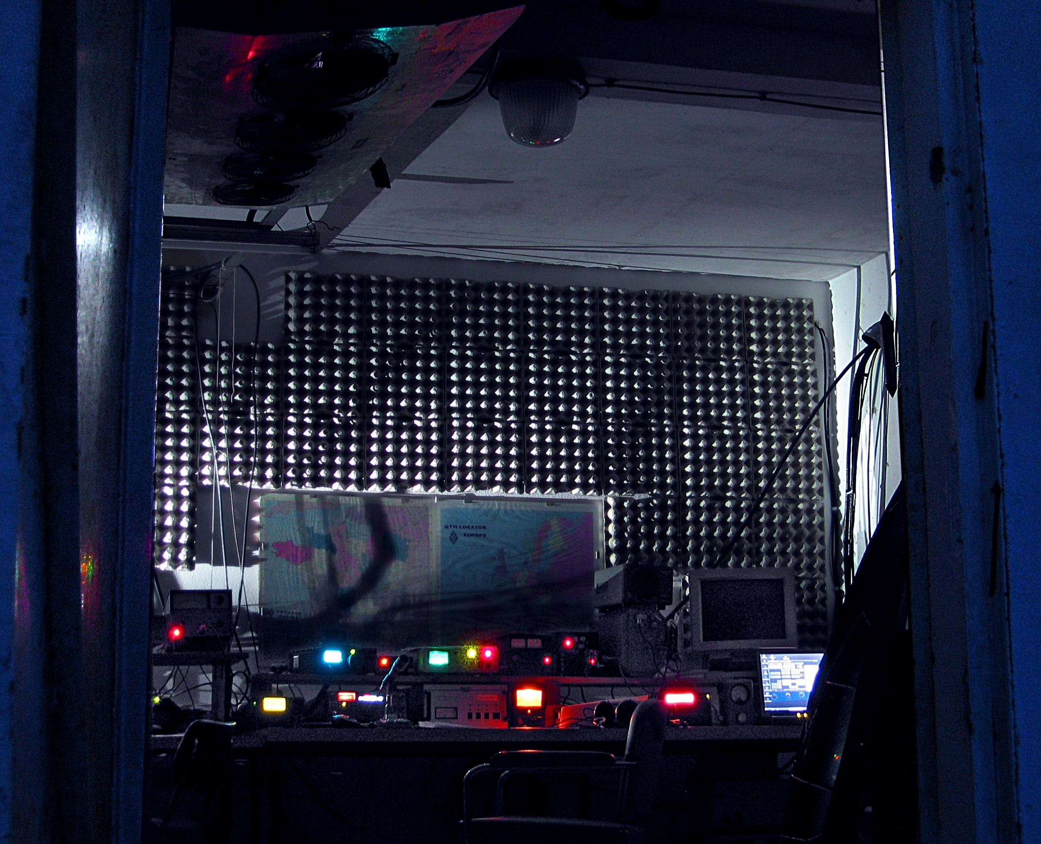 Station radio-amateur du radio-club F6KPL pendant un concours de nuit.